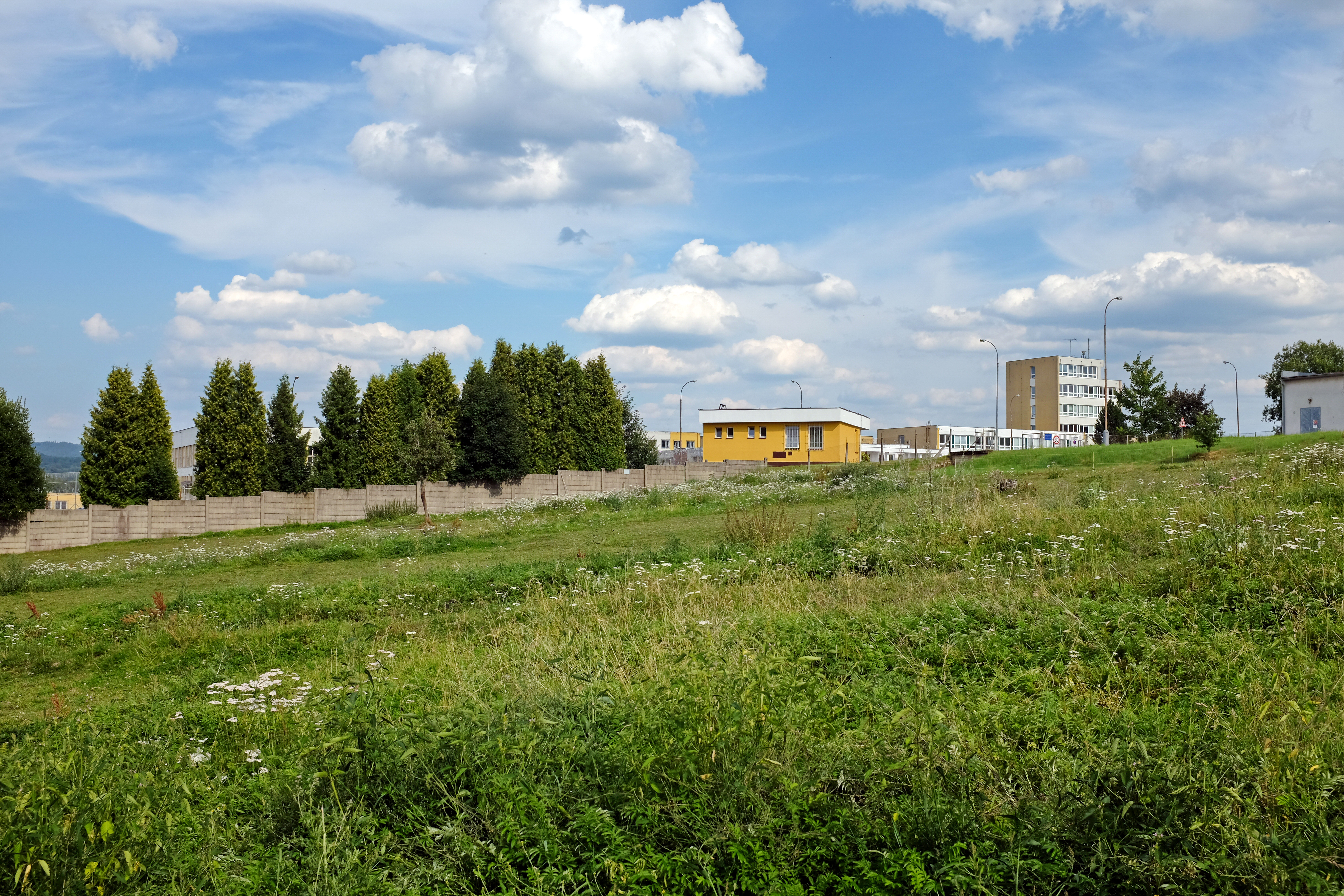 Kolová, osada obce Libavské Údolí, věznice Kynšperk nad Ohří, okres Sokolov